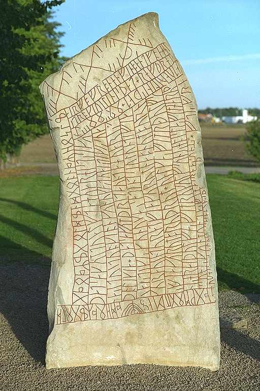 Västra sidan av Rökstenen. Inskriften innehåller anspelningar på nu okända berättelser. Bl.a. omnämns tjugo konungar som skall ha vistats på Själland i fyra vintrar. Motiv: Ög136 Rök Nyckelord: Raä-Fastigheter, Runor Kategori: Runristning/runsten Västra sidan av Rökstenen. Inskriften innehåller anspelningar på nu okända berättelser. Bl.a. omnämns tjugo konungar som skall ha vistats på Själland i fyra vintrar. Ög136 Rök.